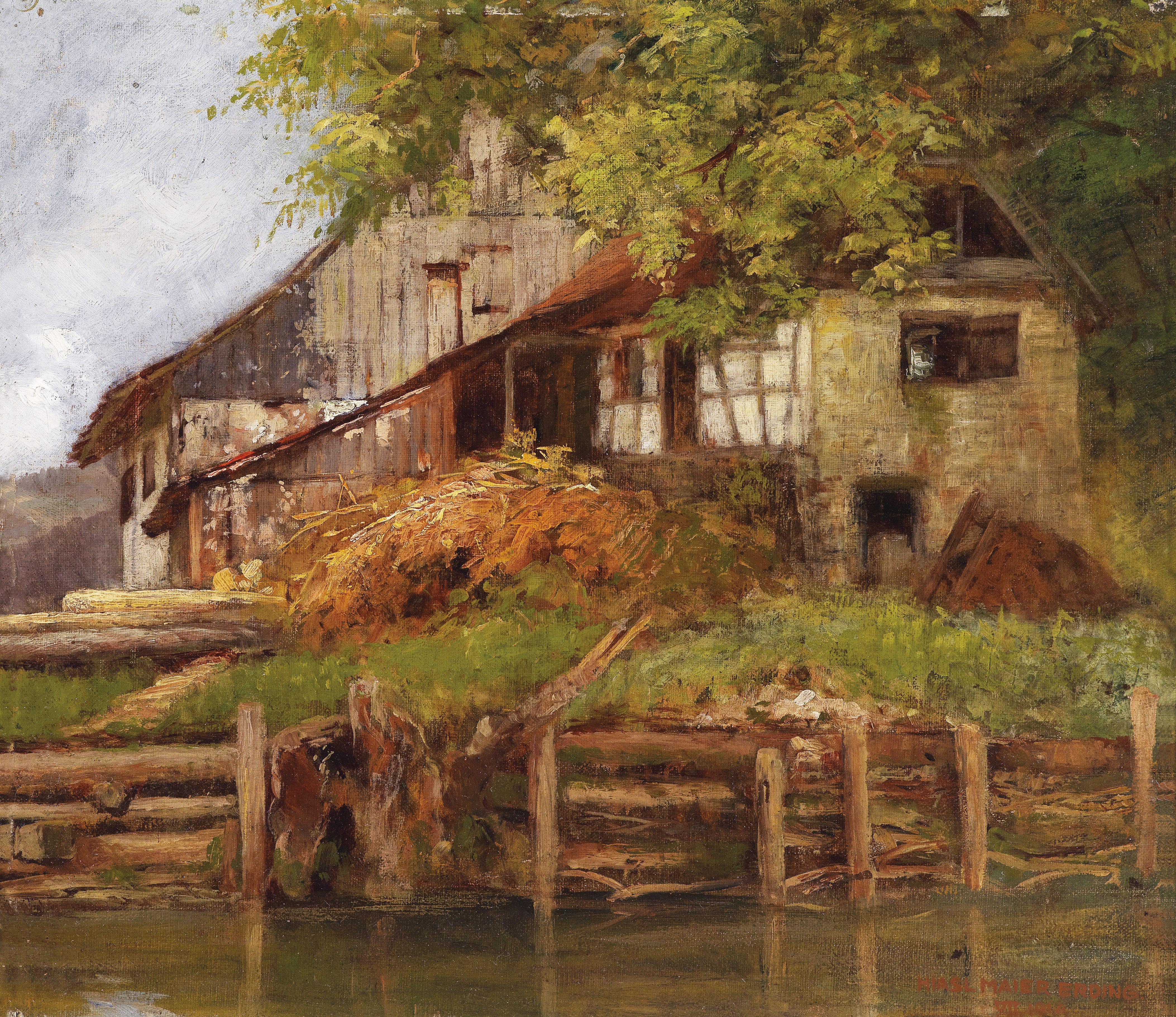 Haus am Seeufer, signiert, datiert Hiasl-Maier-Erding, VII, 1917, rückseitig Sammleretikett Freifrau von Cramer-Klett, Schloß Hohenaschau, Öl auf Leinwand, 35 x 39,5 cm